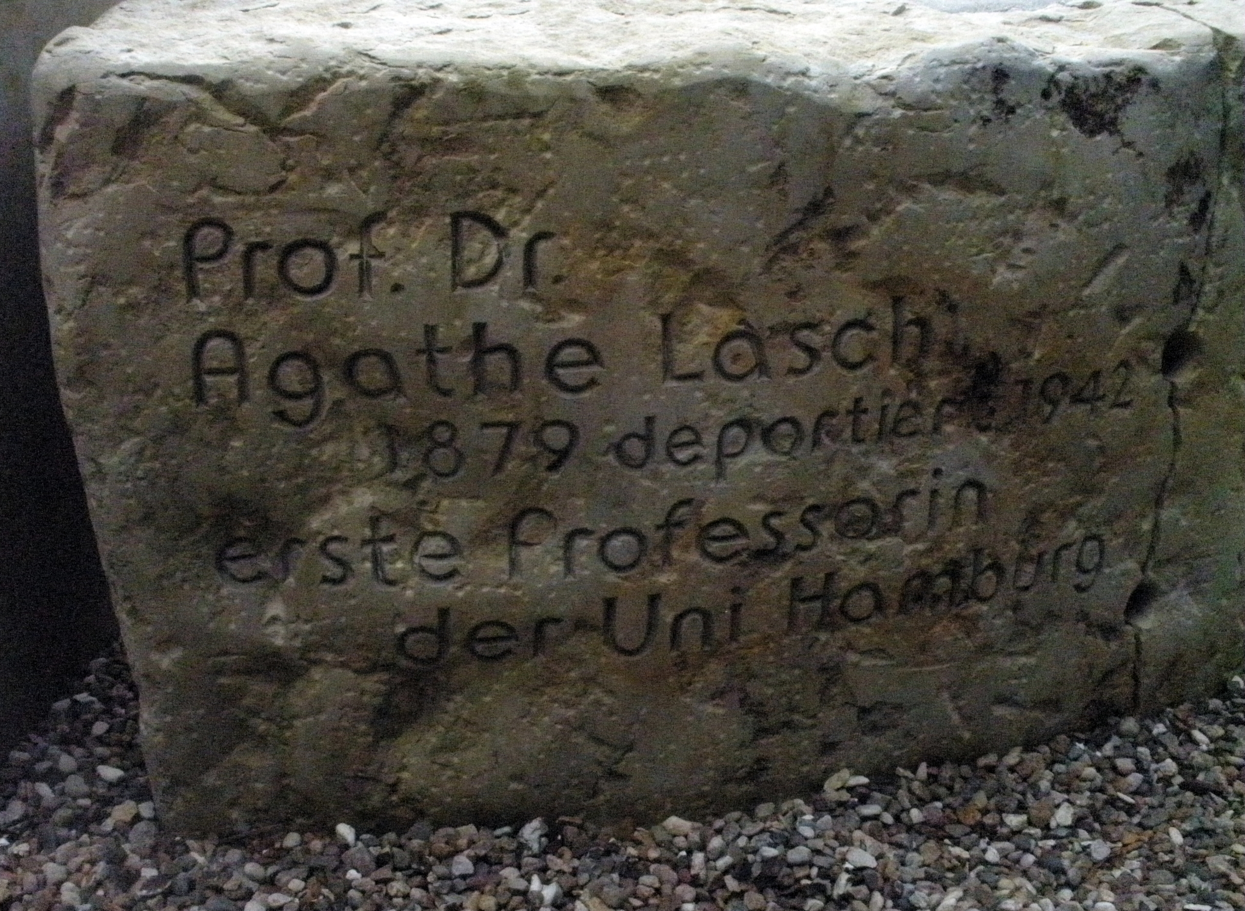 garten der frauen friedhof ohlsdorf